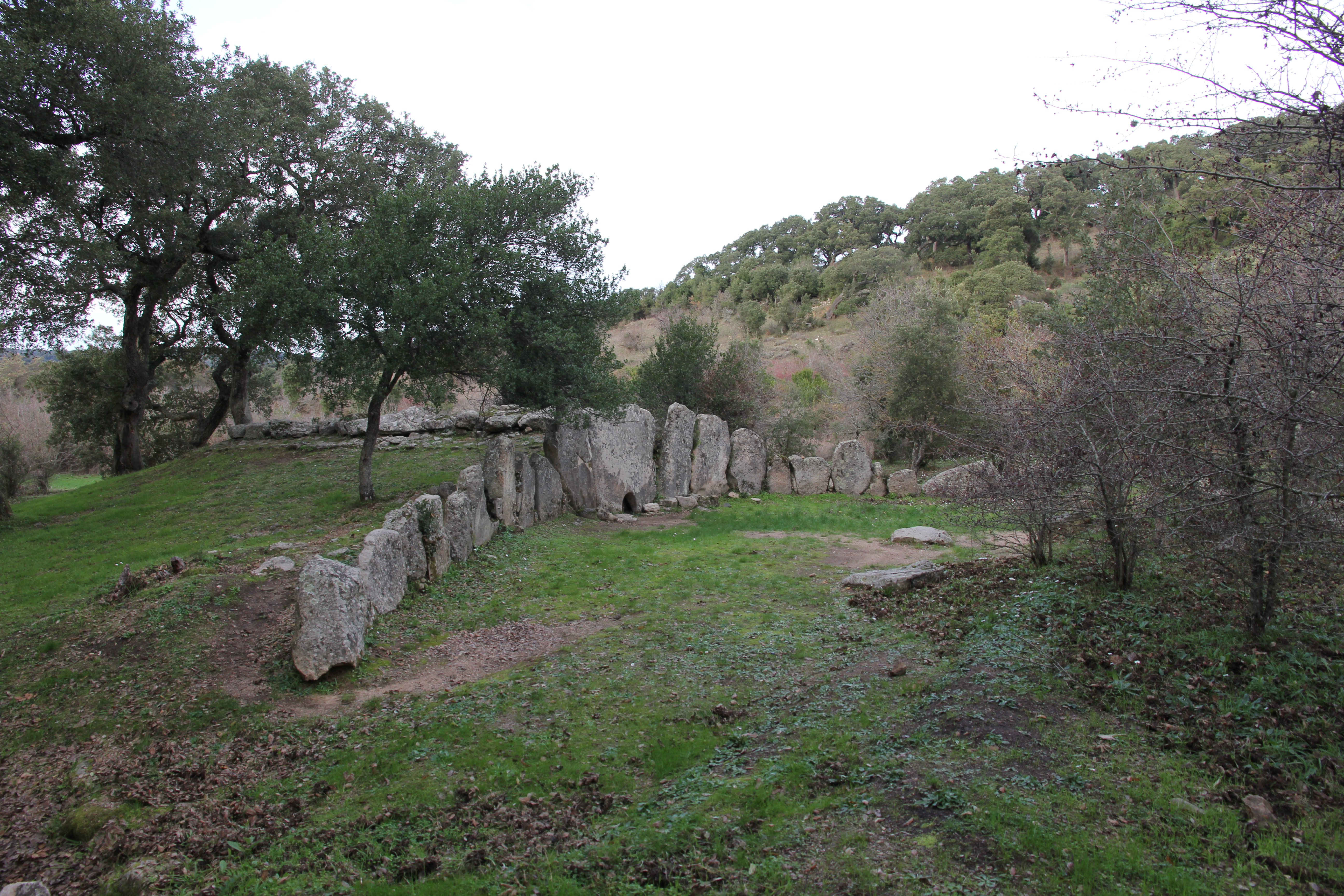 Tomba dei giganti di Pascaredda - m 442 s.l.m.